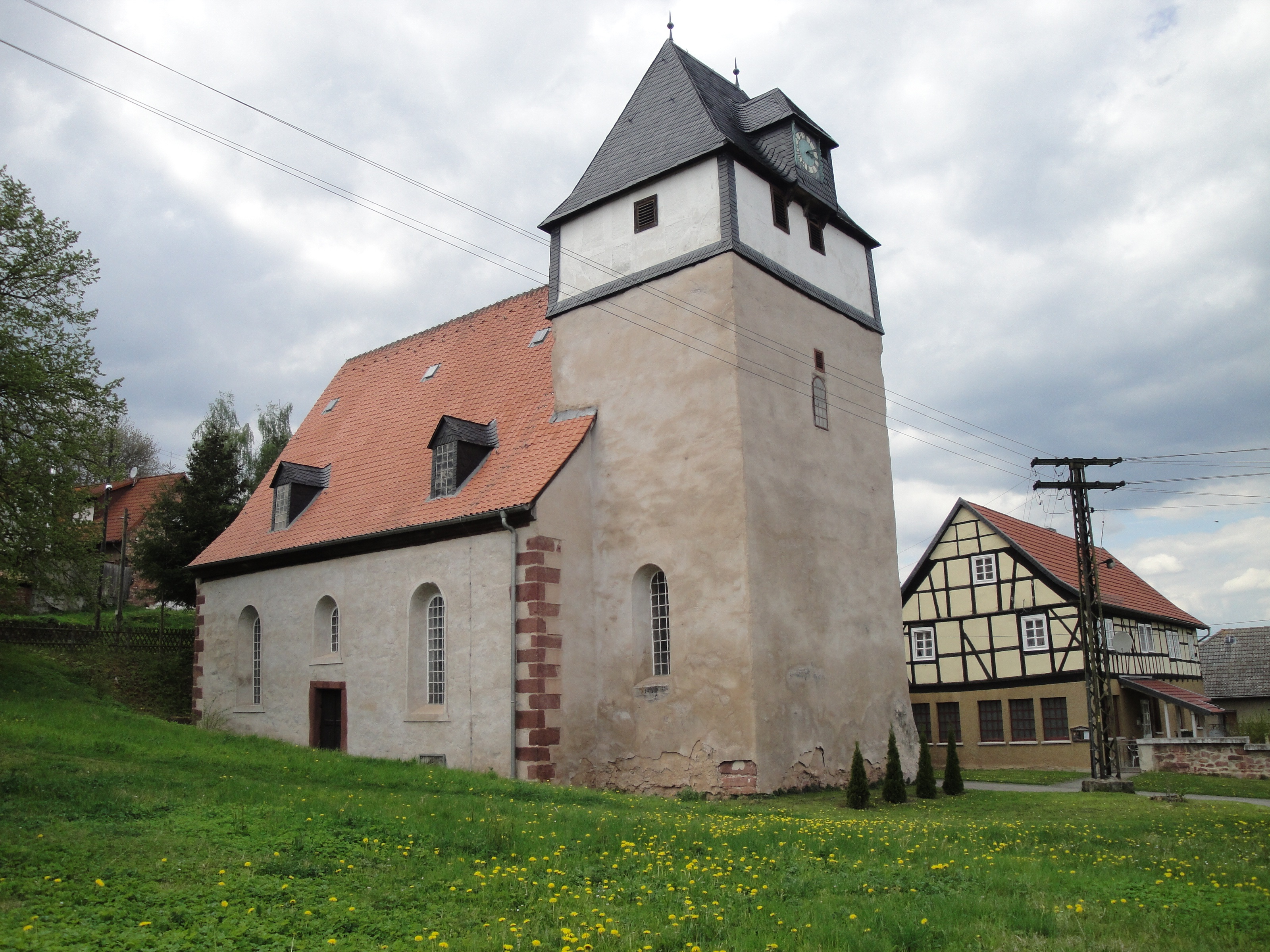 Evangelische Sankt-Nicolai-Kirche Bösenrode